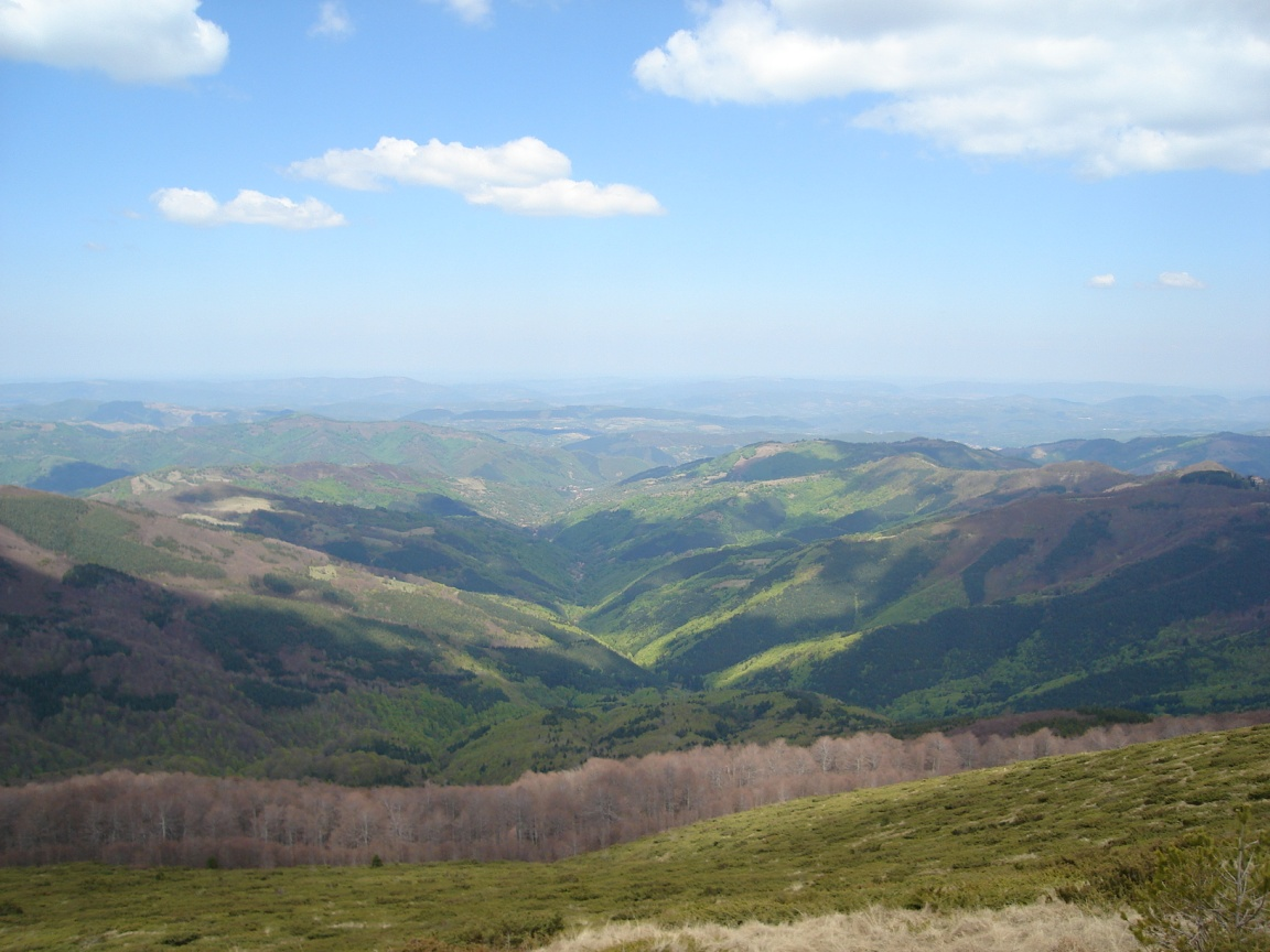 Изглед от Беклемето